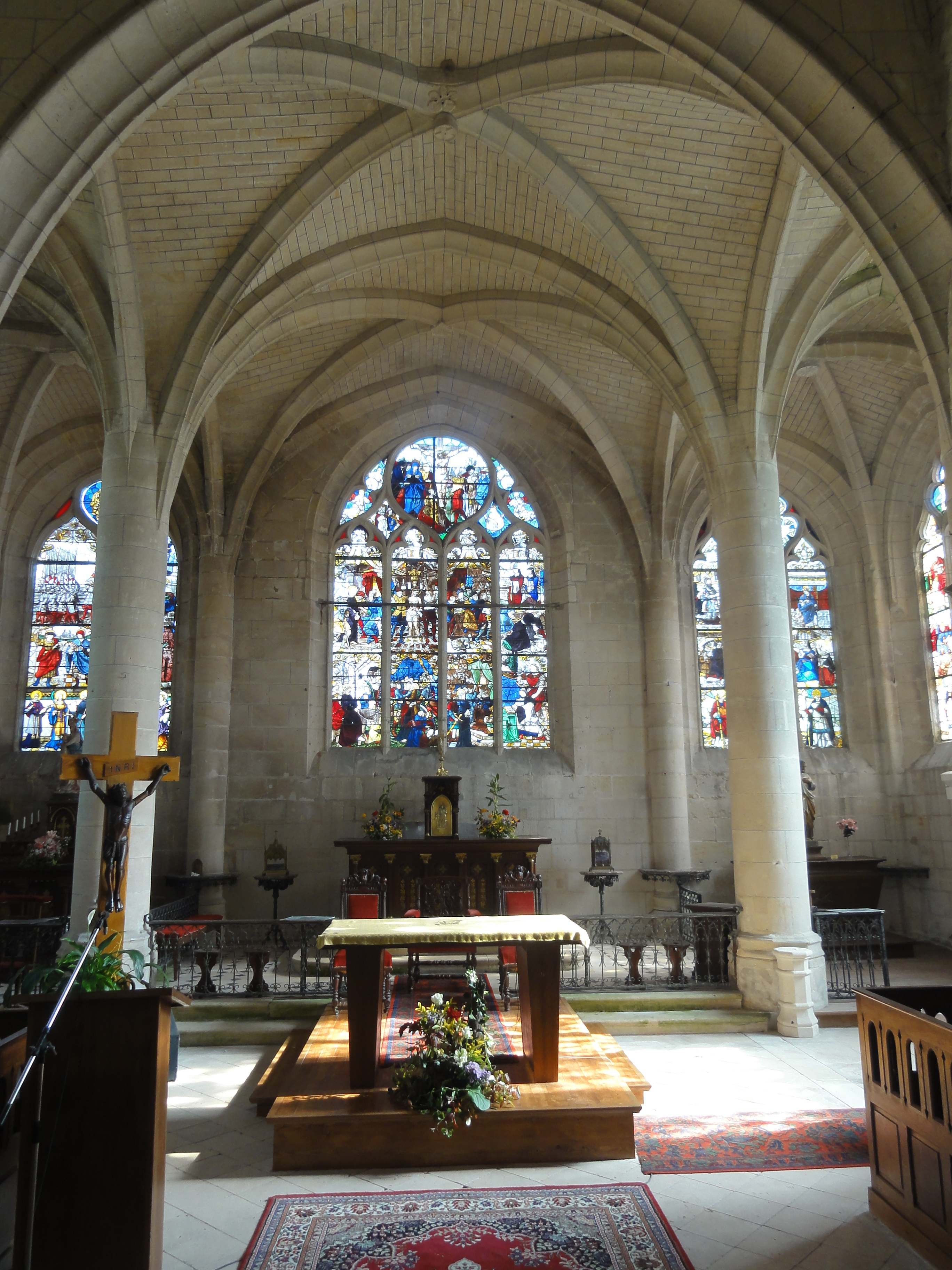 Intérieur de l'église - voir titre.